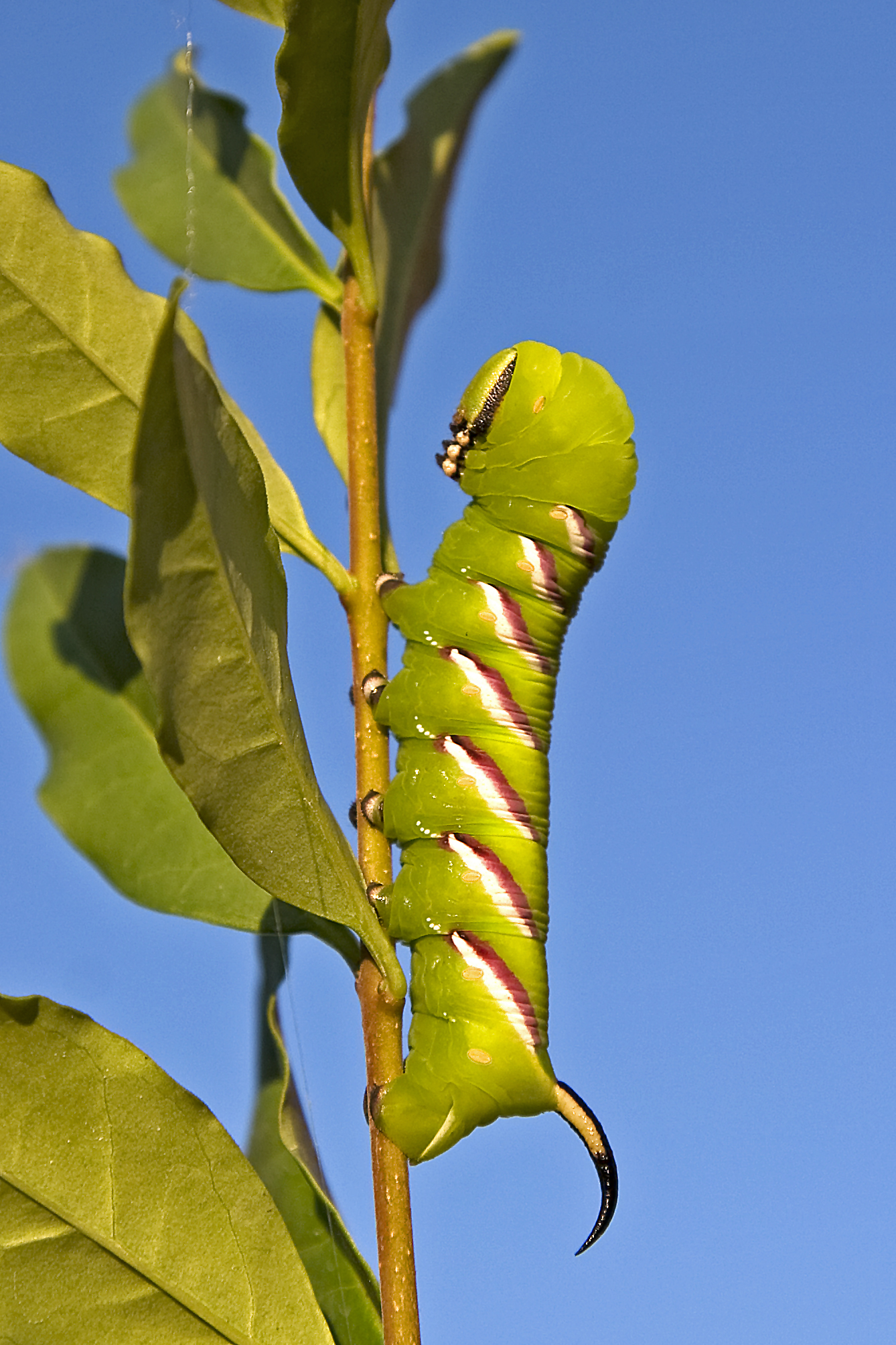 einige Tage vor der Verpuppung - aufgenommen in 33428 Harsewinkel (Germany)